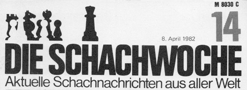 Kopf der Schachzeitschrift "Die Schachwoche", Heft 14 des Jahrgangs 1982.